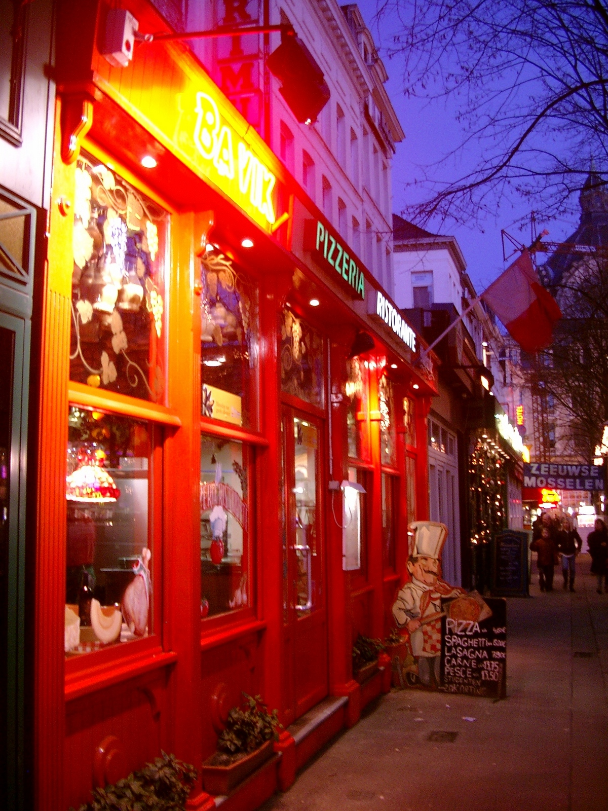 "De Keyserlei" in Antwerp, Belgium: a pizzeria.